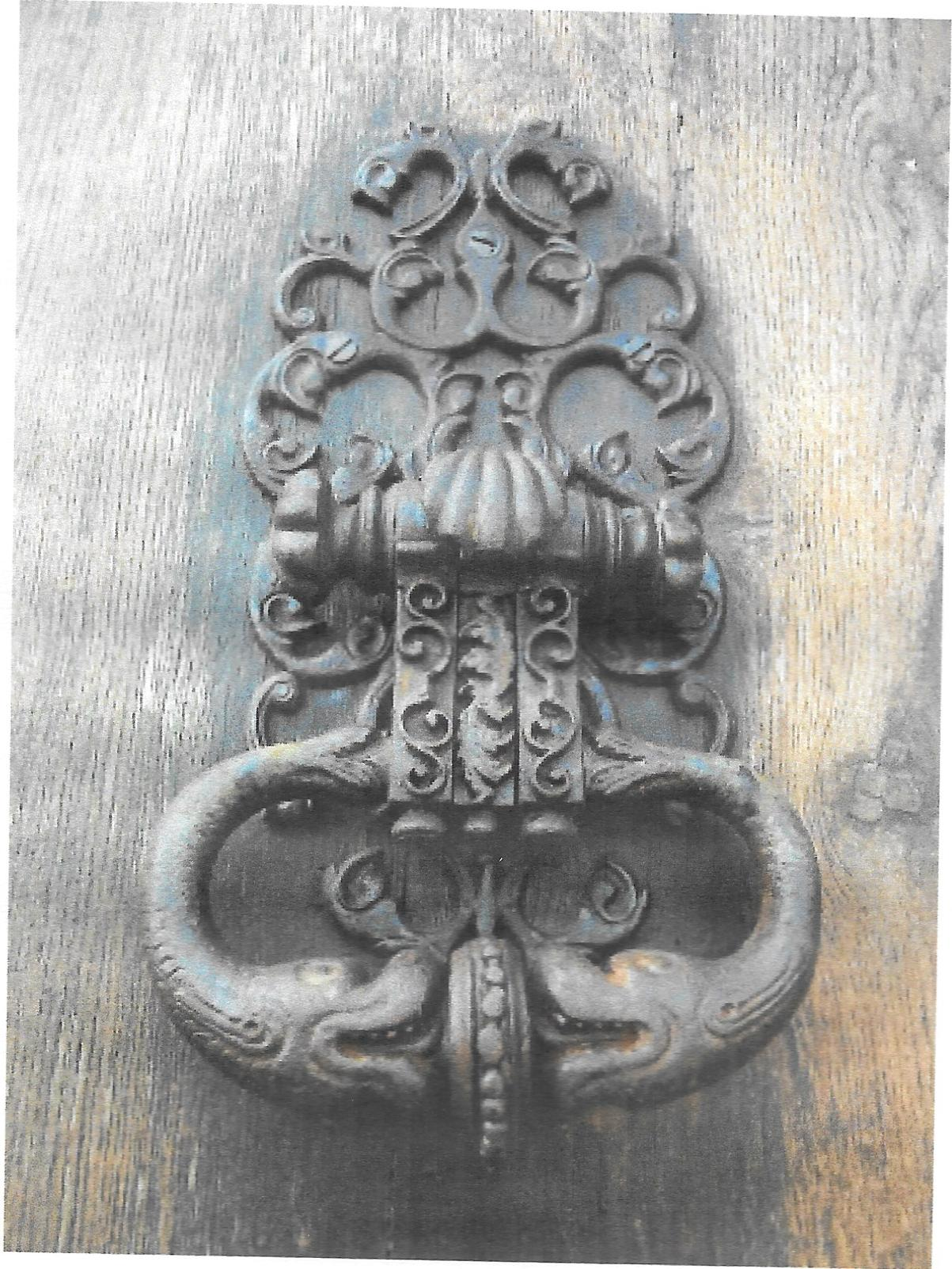 Serrure_couffoulens